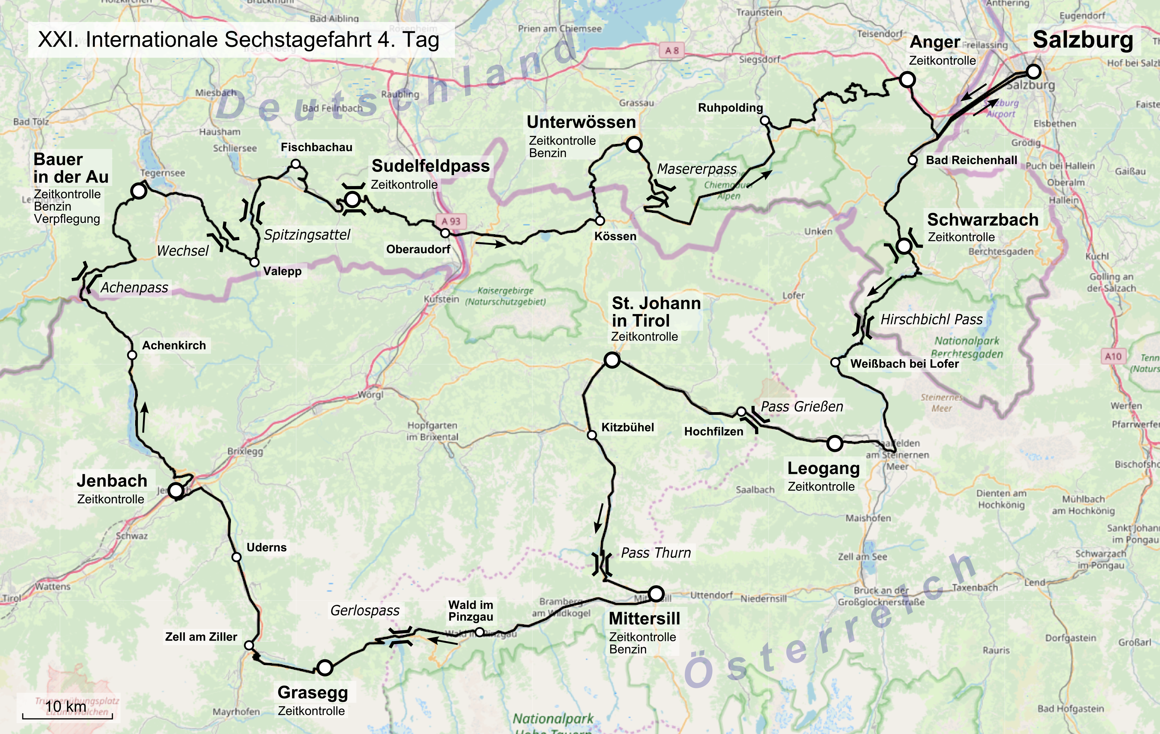 Karte der 21. Internationale Sechstagefahrt, Route des 4. Tages